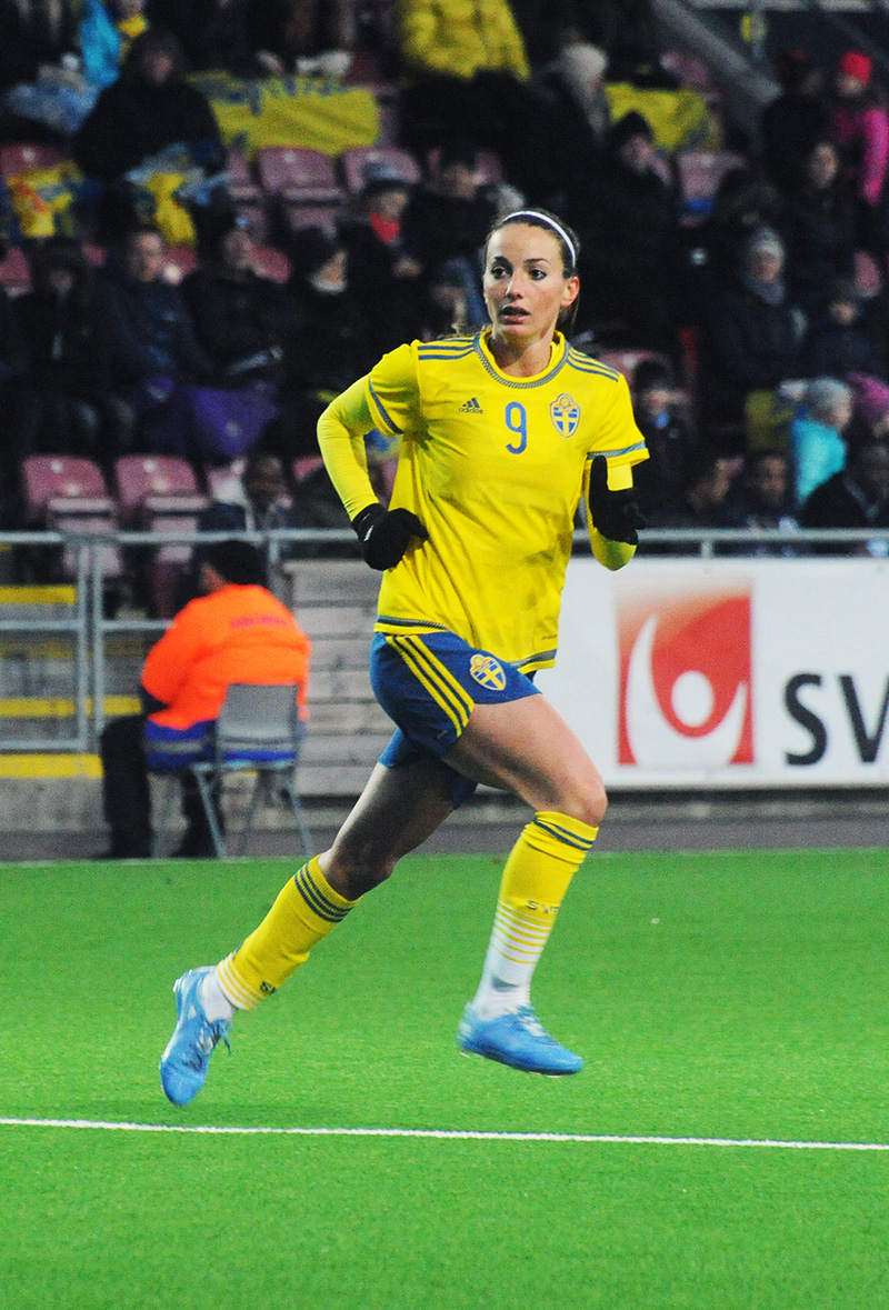 a_62_0895